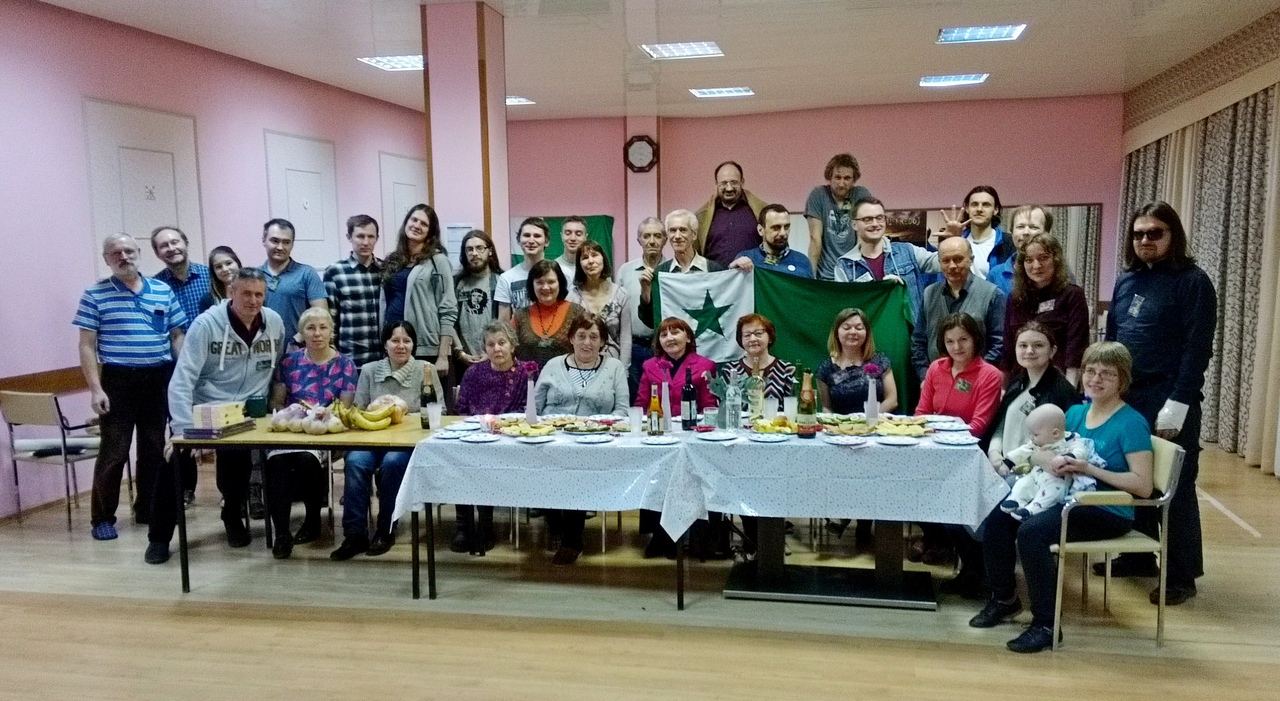 Komuna foto dum APERo-13